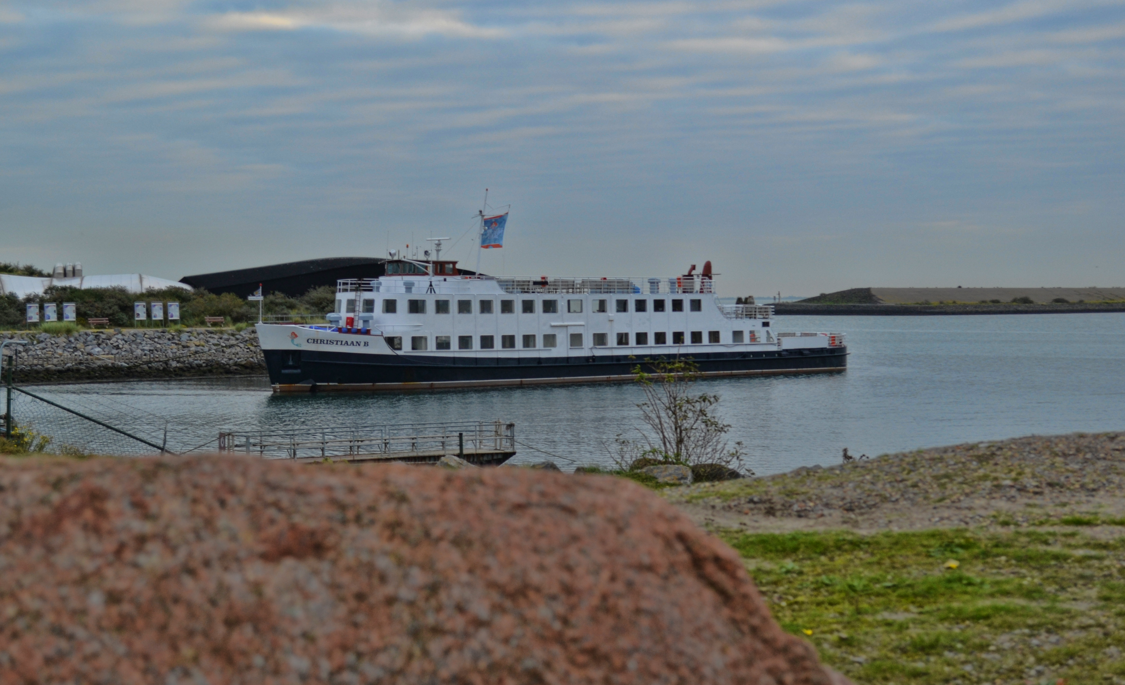 Rondvaart boot Neeltje jans Delta Park